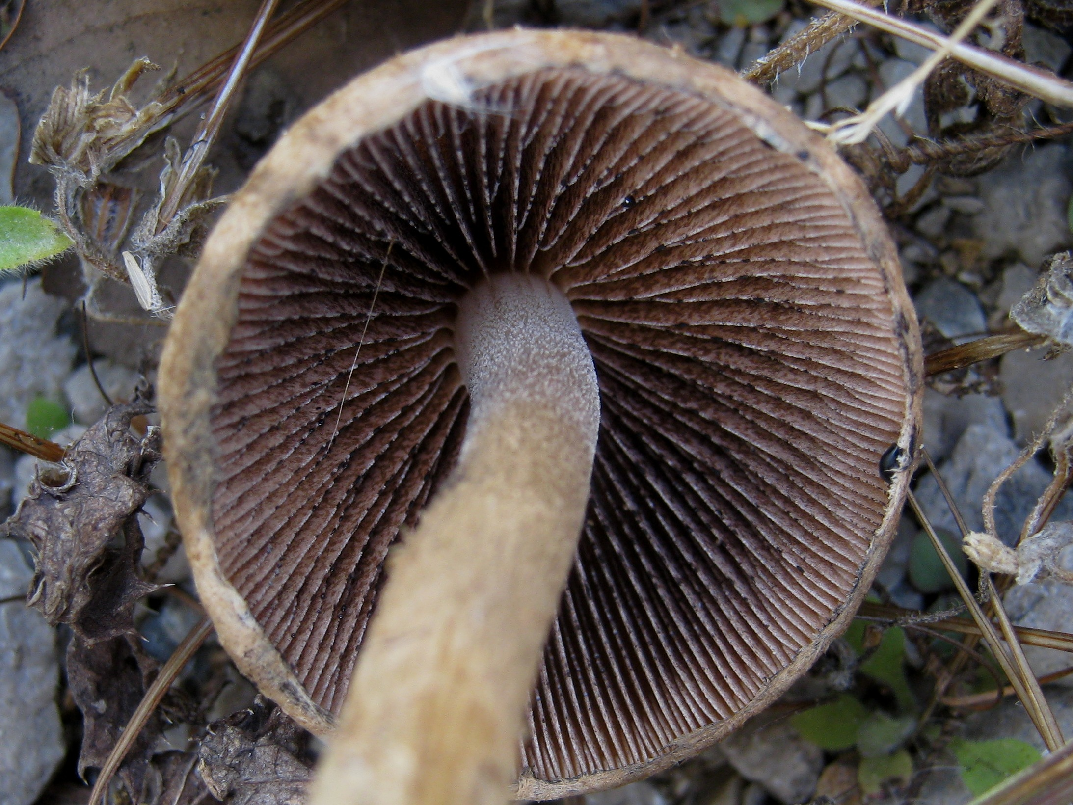 Lacrymaria lacrymabunda (Bull.) Pat.